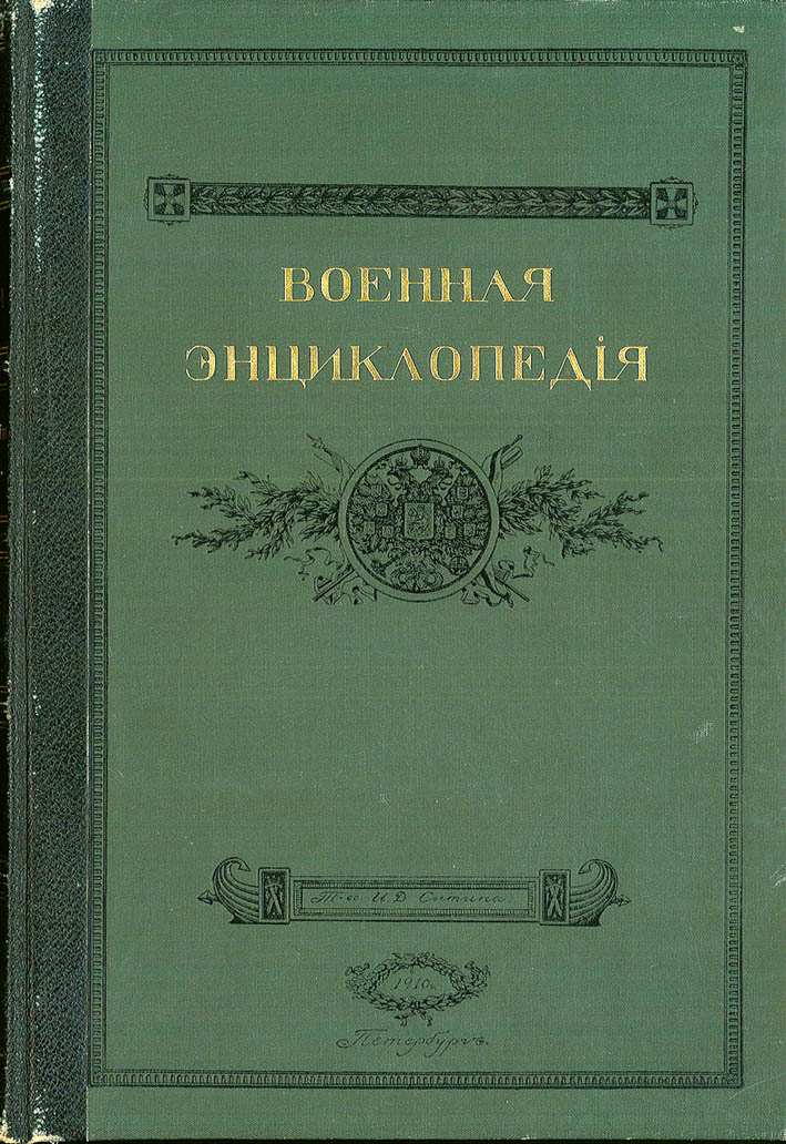 Обложка первого тома «Военной энциклопедии» Сытина